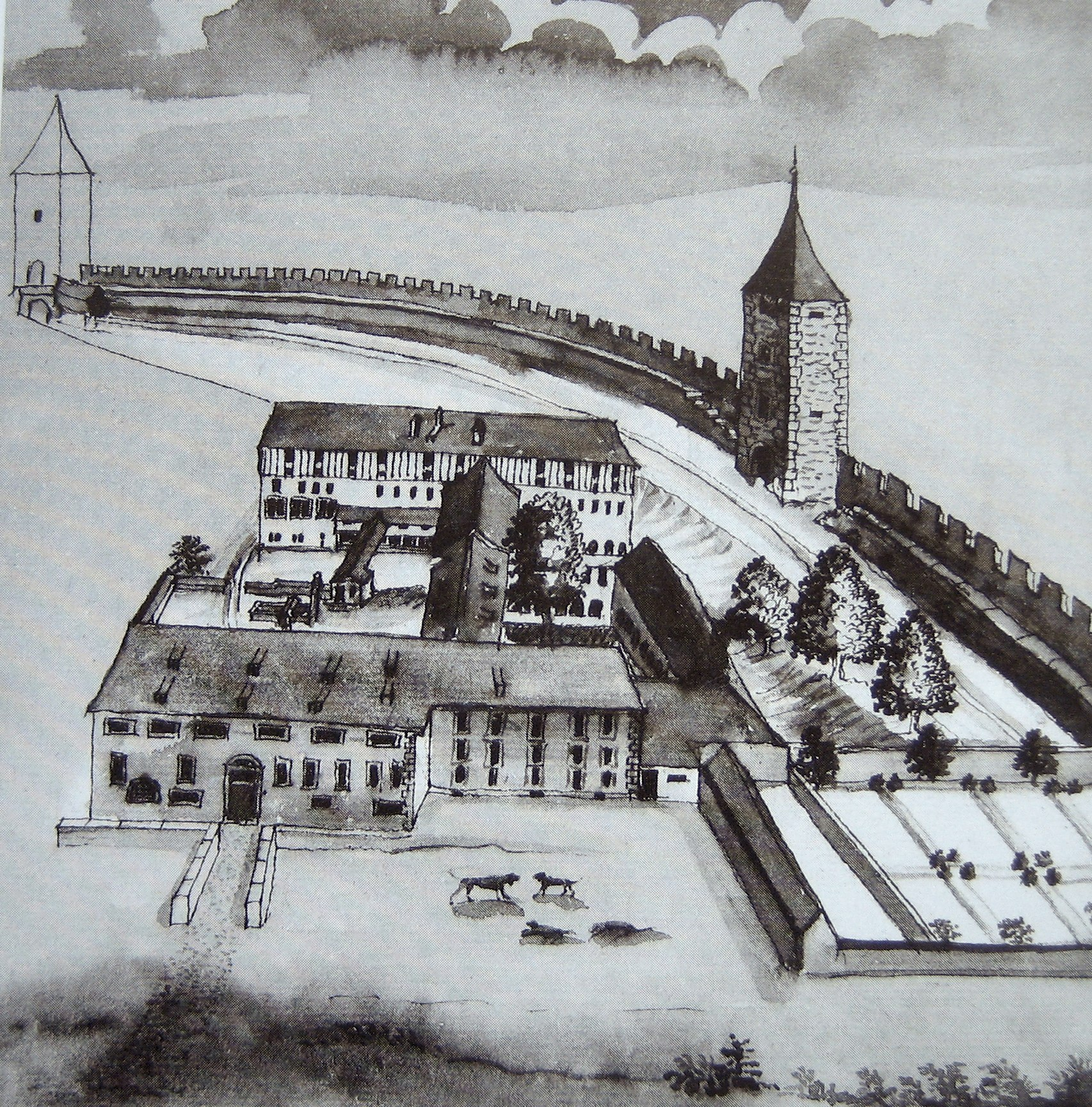 Klosterareal von Südwesten um 1700, lavierte Federzeichnung aus dem Regimentsbuch von Gerold Escher